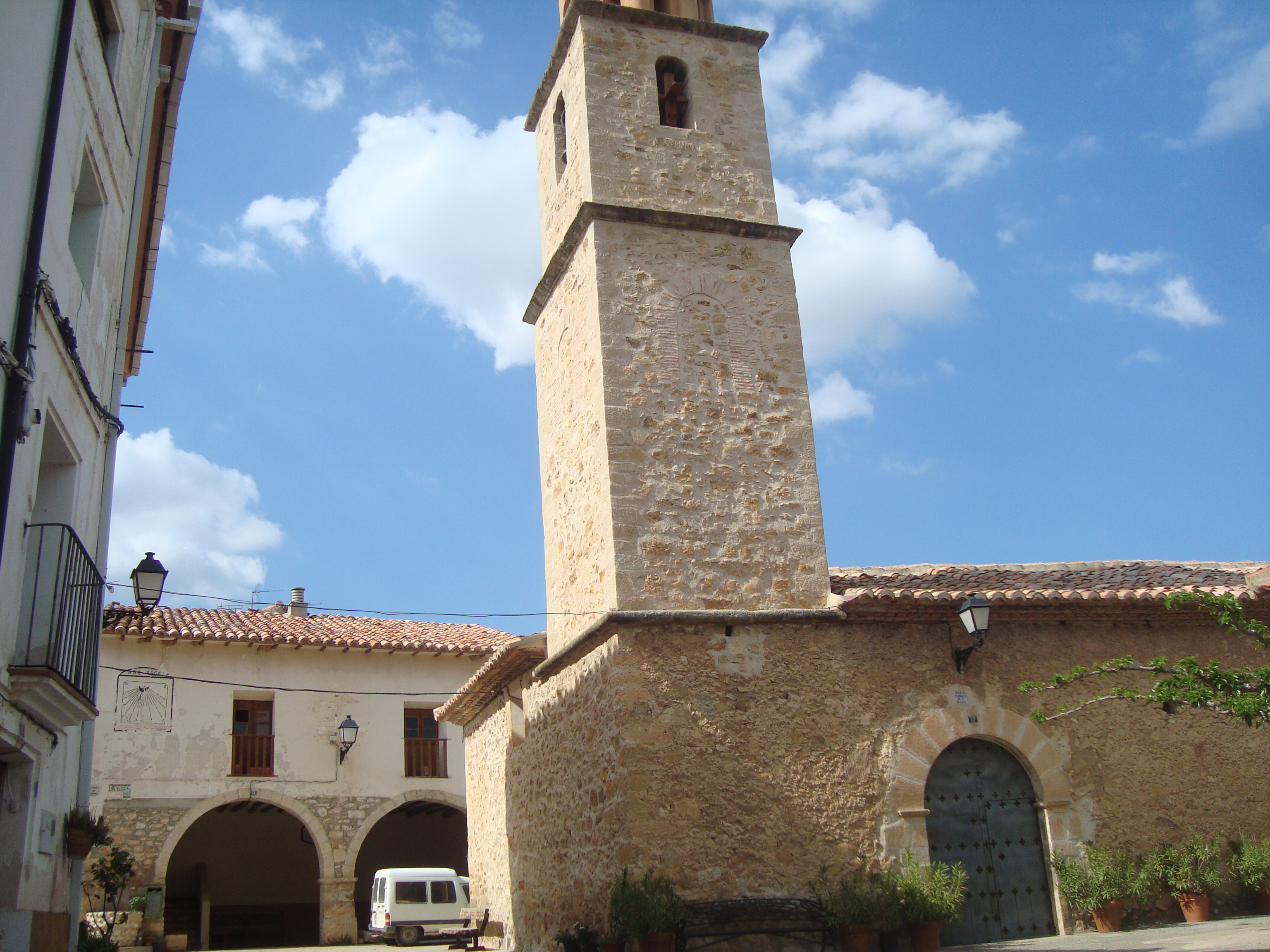 Iglesia de San Julián, Abenfigo (Castellote, Teruel)